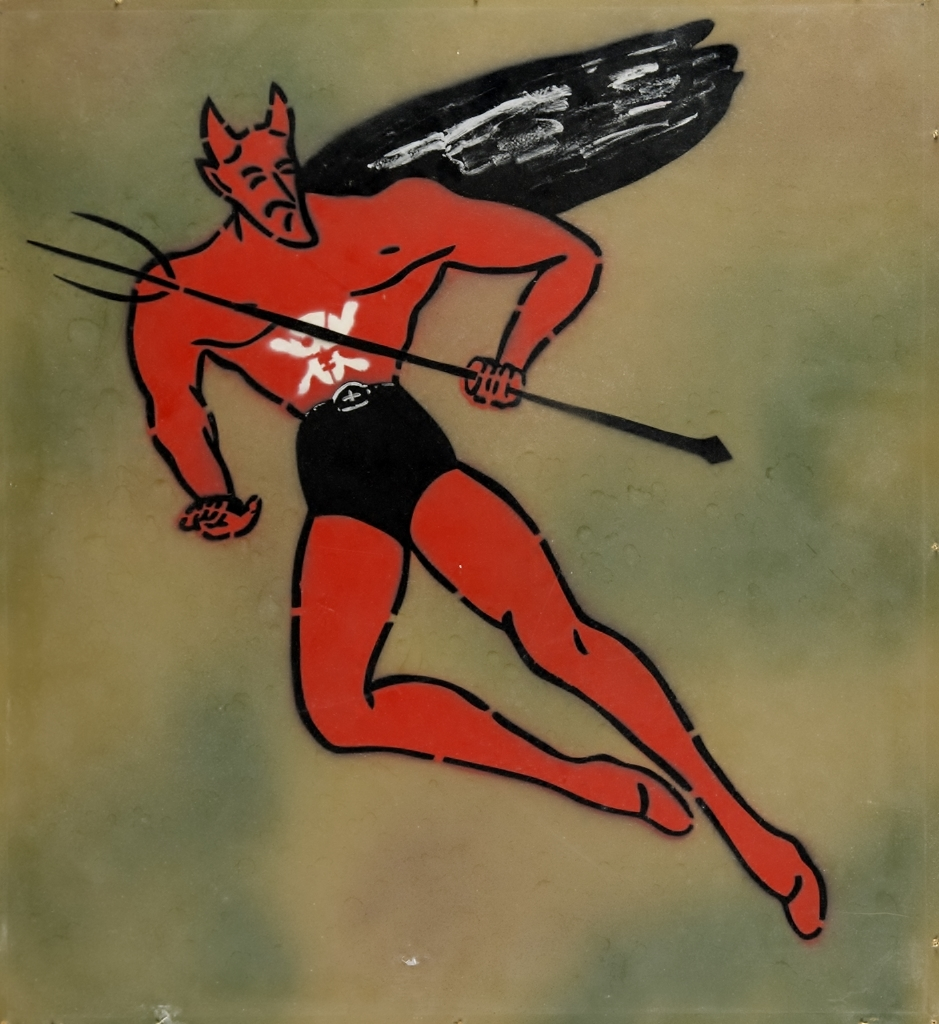 Divisionsemblem för Ivar Röd, den första divisionen vid Göta flygflottilj (F 9). År 1942 började man på F 9 att märka sin flygplan med en gemensam symbol, likt amerikanska och andra krigförande länders flygvapen. Den första divisionen valde utifrån sin divisionsfärg en röd djävul och upphovsman till denna skapelse är enligt uppgifter av en värnpliktig vid divisionen som i efternamn hette Martinsson. Han flög dock inte utan hade diverse uppgifter på divisonen, som att bokföra divisionens flygtidsuttag